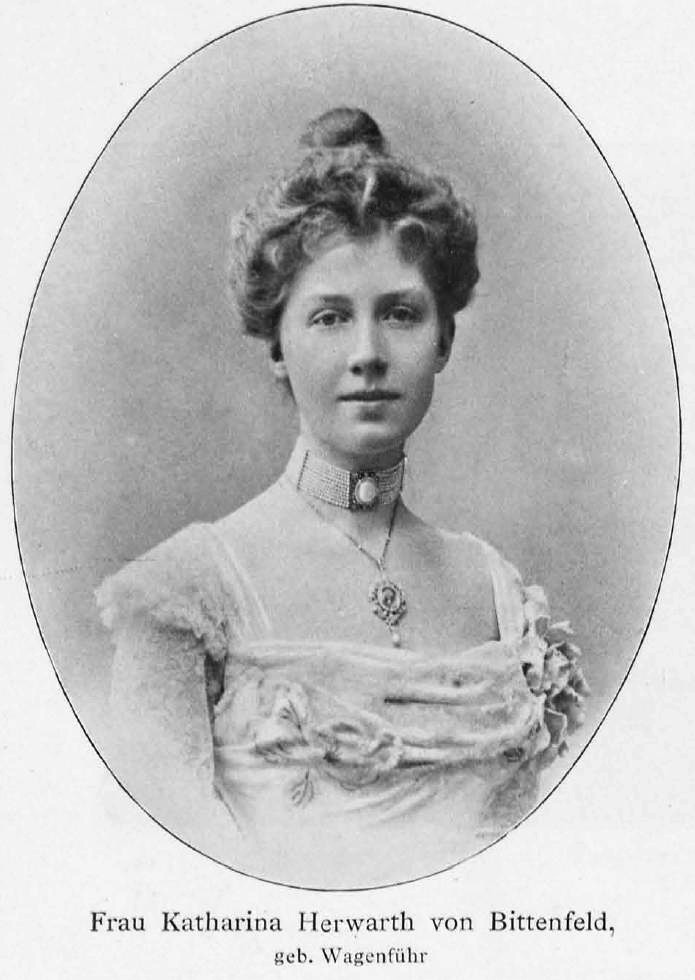 Modesta Friederike Katharina Herwarth von Bittenfeld, geb. Wagenführ-Tangerhütte. Ehefrau des deutschen Diplomaten und Offiziers Hans-Wolfgang von Herwarth.